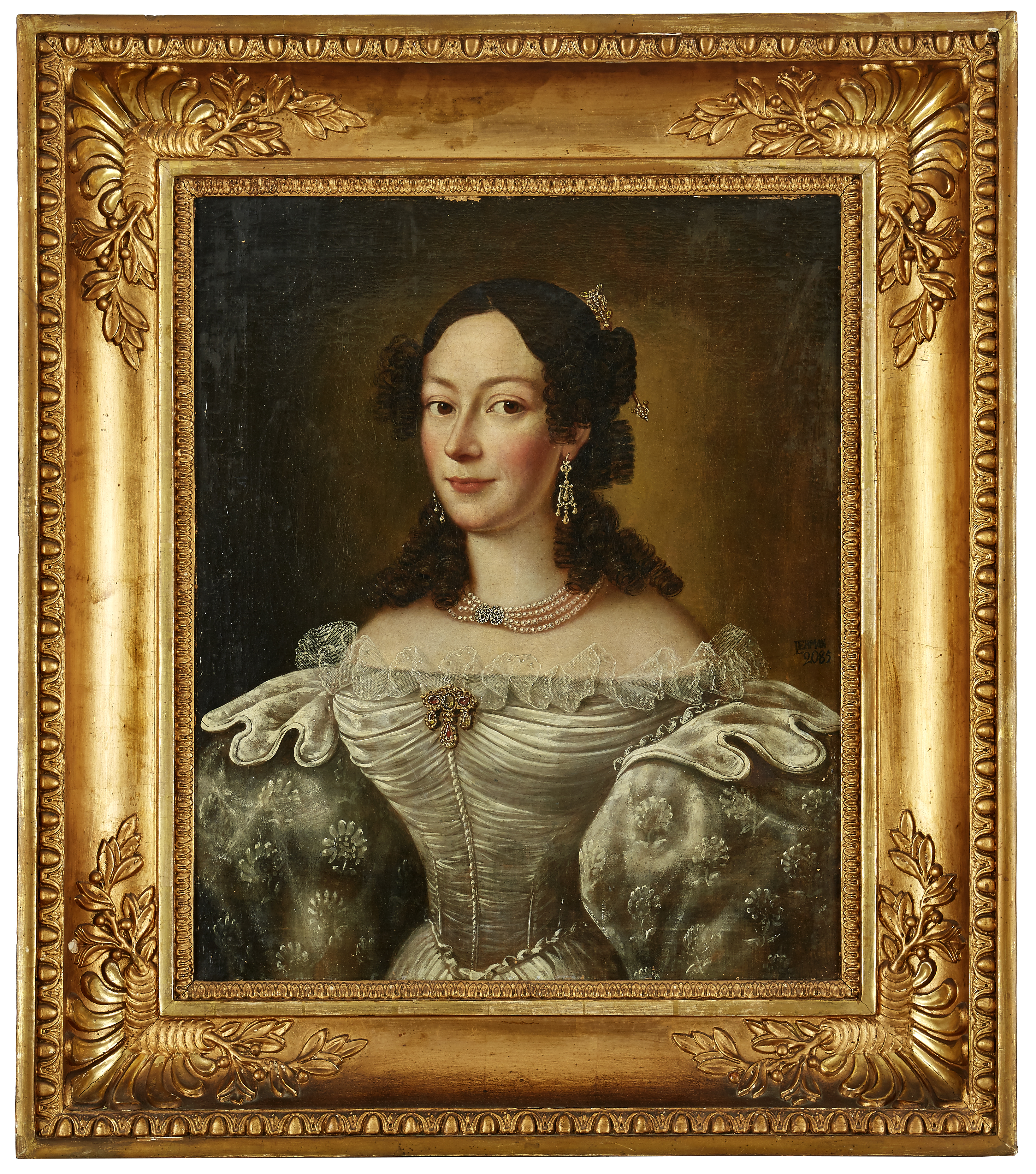 Fredrika Elisabet Rosenberg, född 19 september 1800 och död den 27 december 1876 i Stockholm, dotter av direktören vid Ostindiska kompaniet Sven Olof Rosenberg och hans första fru Eva Örn. Målning av Carl Peter Lehman från 1835.